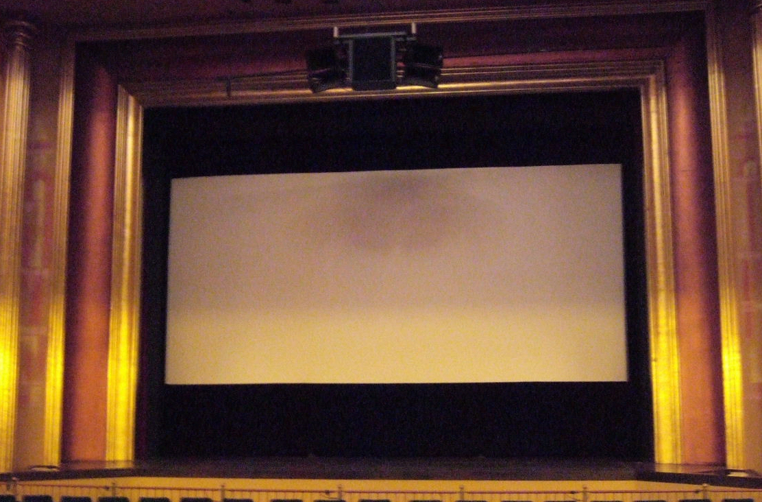 Bühne des Kinos „Metropol“ in Bonn